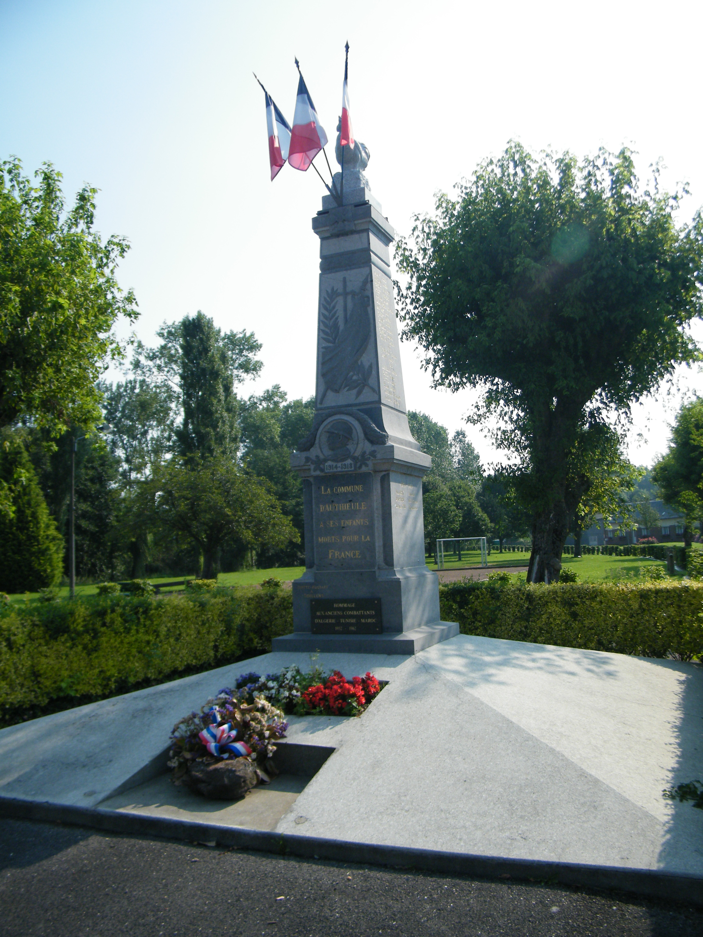 Monument.